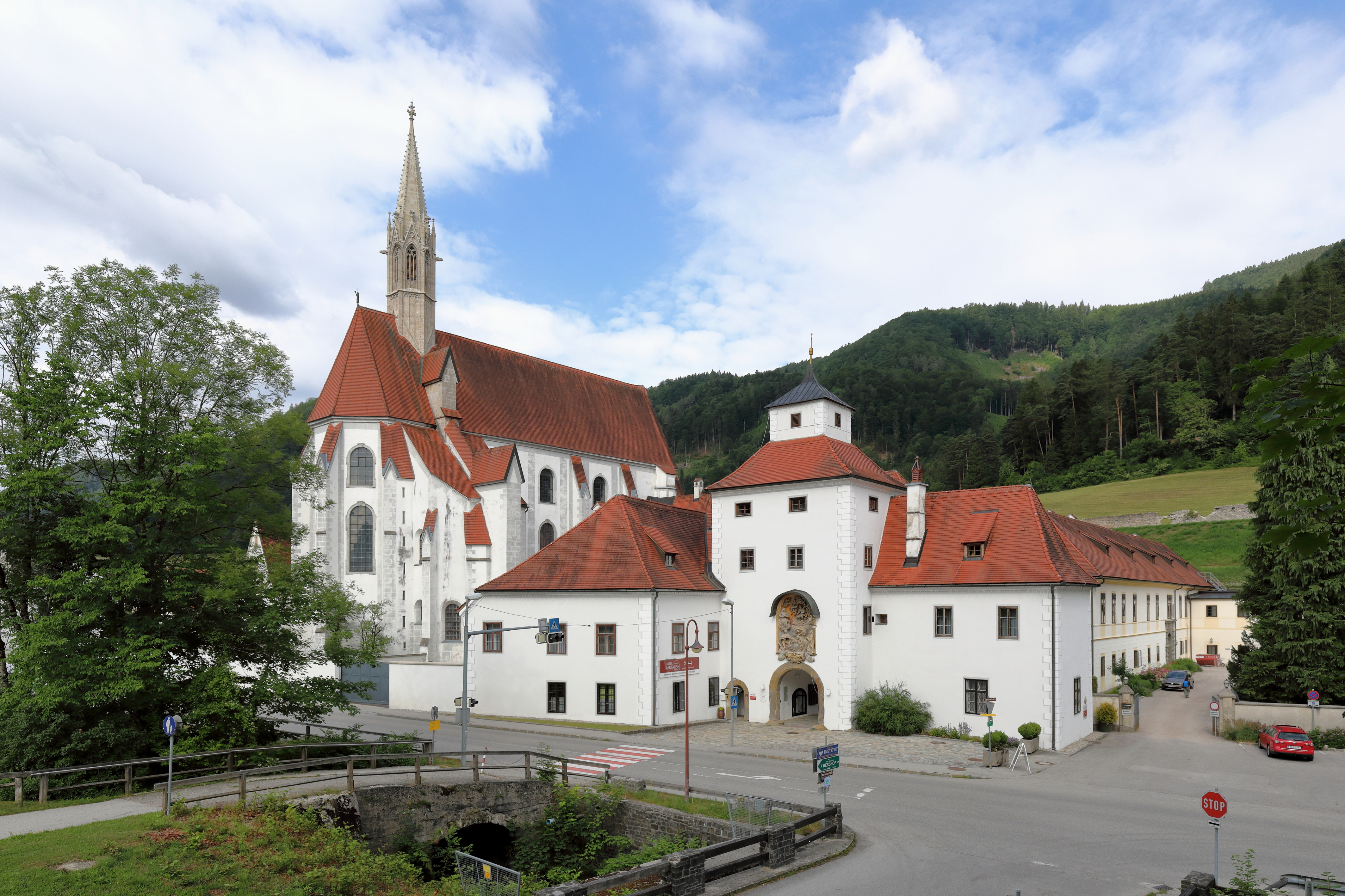 Nordostansicht des Torturms des ehemaligen Kartäuserkloster Marienthron in der niederösterreichischen Marktgemeinde Gaming.Links die ehemalige Kartäuserkirche, Bildmitte der Torturm und rechts hinten der ehemalige Prälaturtrakt. Das Kloster war die größte Kartause der deutschen Ordensprovinz, wurde ab 1332 errichtet und 1782 unter Kaiser Joseph II. aufgelöst.